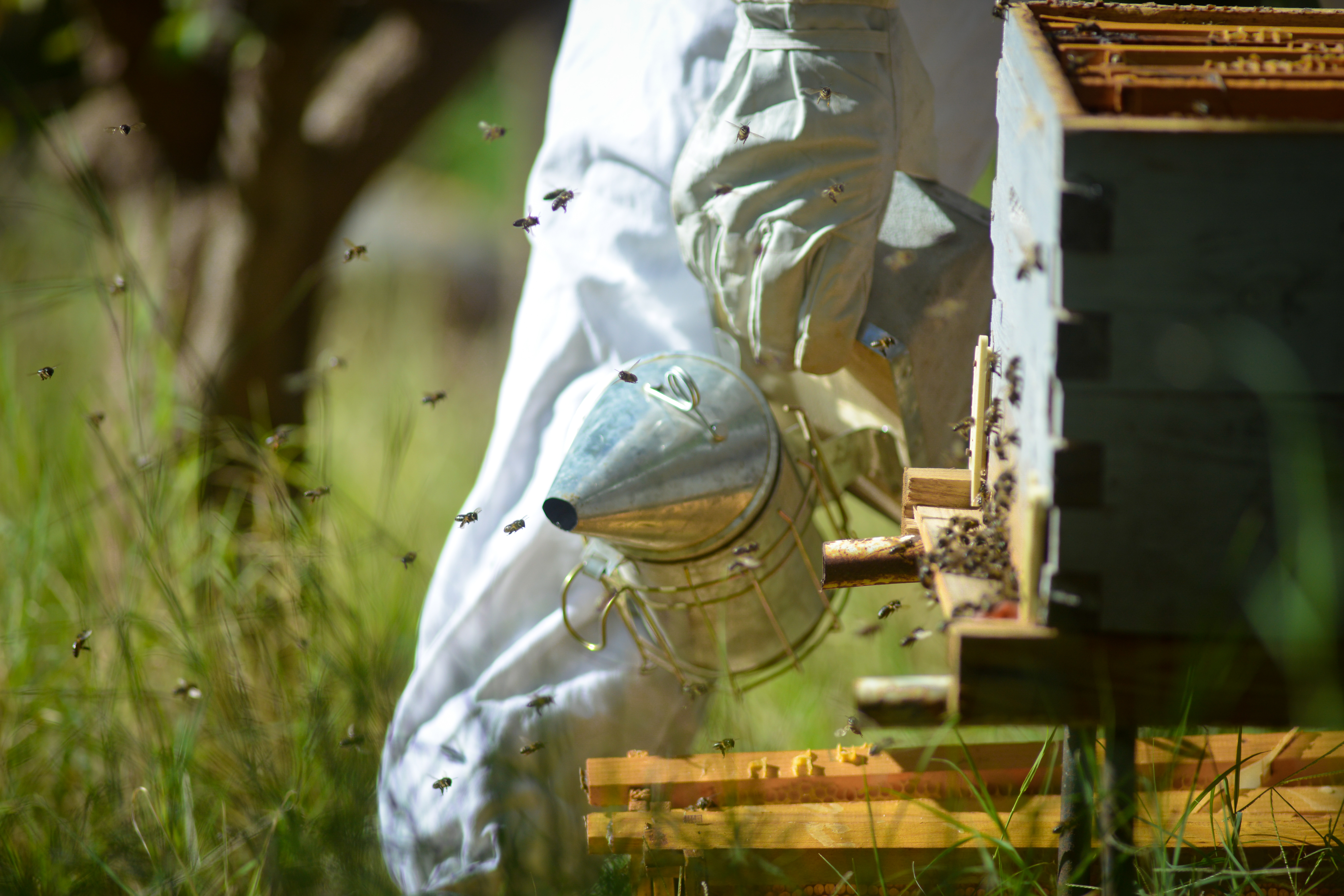 النحال أثناء مراقبة صناديقه This is an image of "African people at work" from Algeria